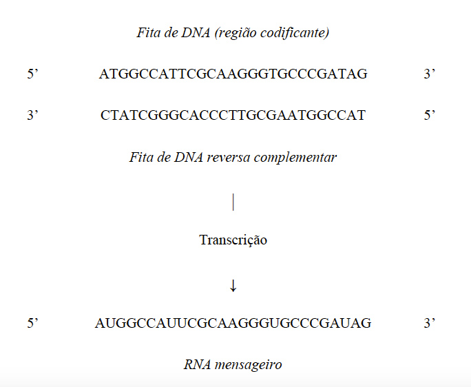 Transcrição